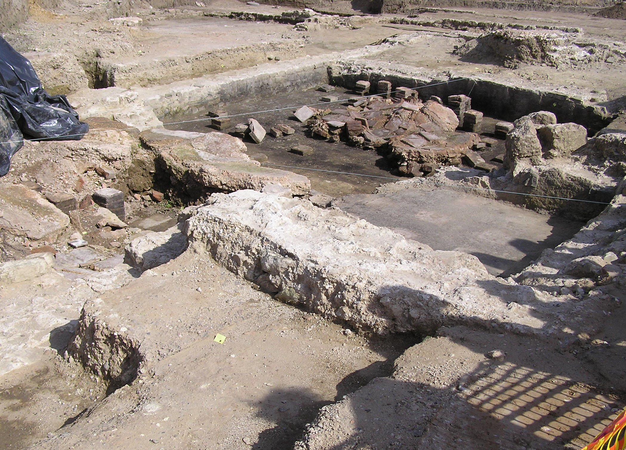 Das Badgebäude des vicus bonnensis (ziviele römische Siedlung in Bonn). Im Hintergrund ist der rußgeschwärzte Boden des beheizten Zwischenraumes für die Fußbodenheizung des Heiß und Laubades zu sehen. Darin liegen die Reste des zusammengestürtzten Bodens. Rechts erkennt man ein höher gelegenes Becken. Ganz hinten ist ein Mühlstein zu sehen.